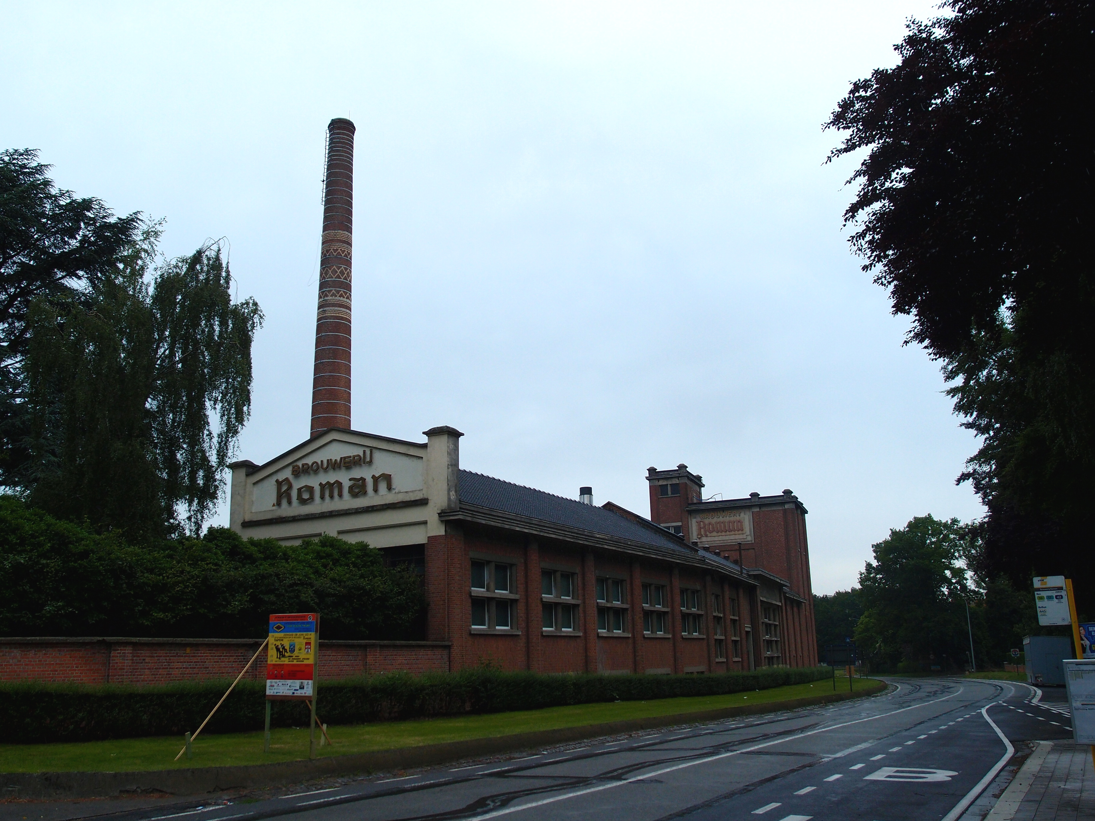 Belgische Brauerei "Roman" im Dorf Mater bei Oudenaarde Datum: 09.06.2014 Urheber: M. Pfeiffer alias Benutzer:Gordito1869 Quelle: Privates Fotoarchiv des Urhebers